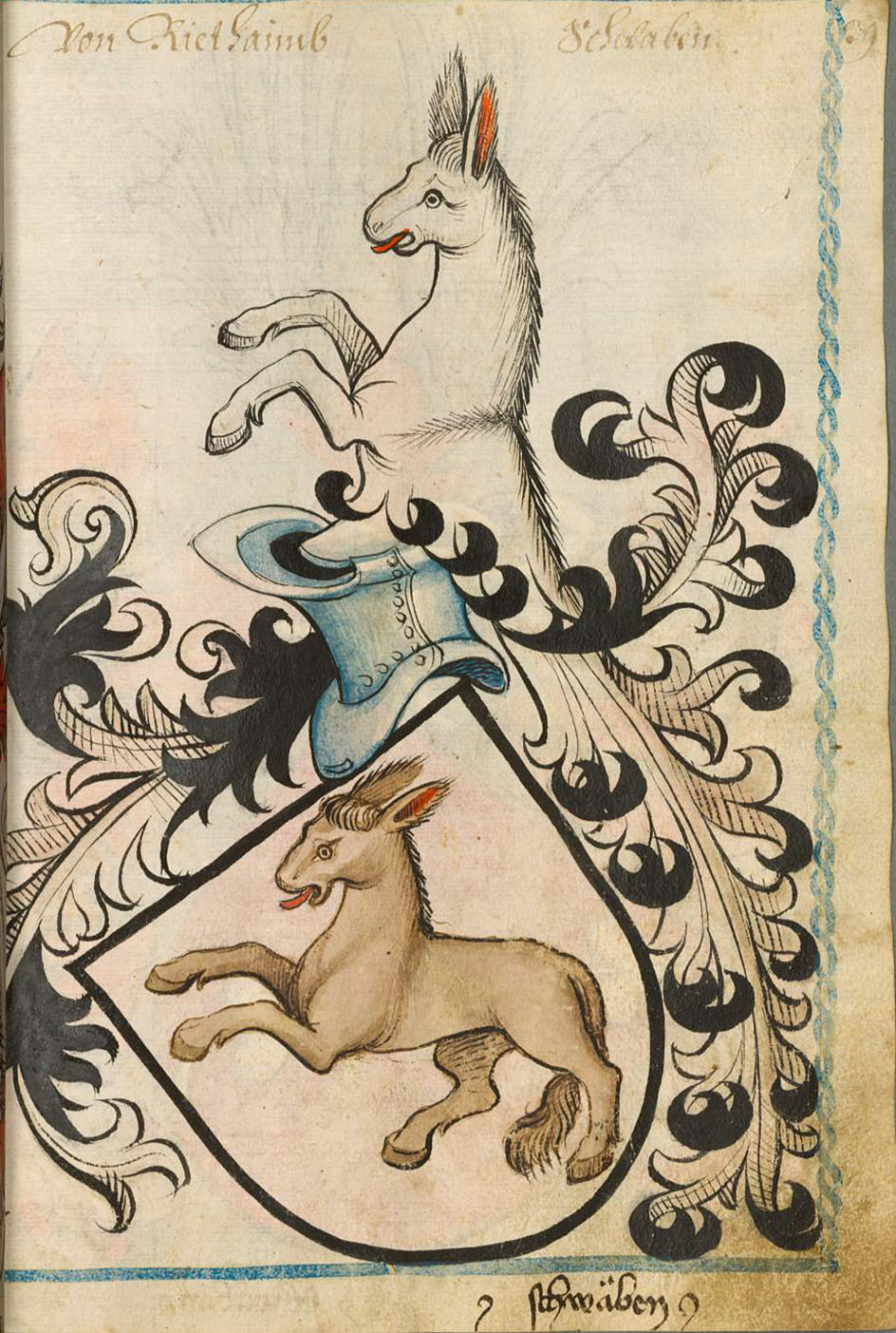 Scheibler'sches Wappenbuch, älterer Teil Rietheim